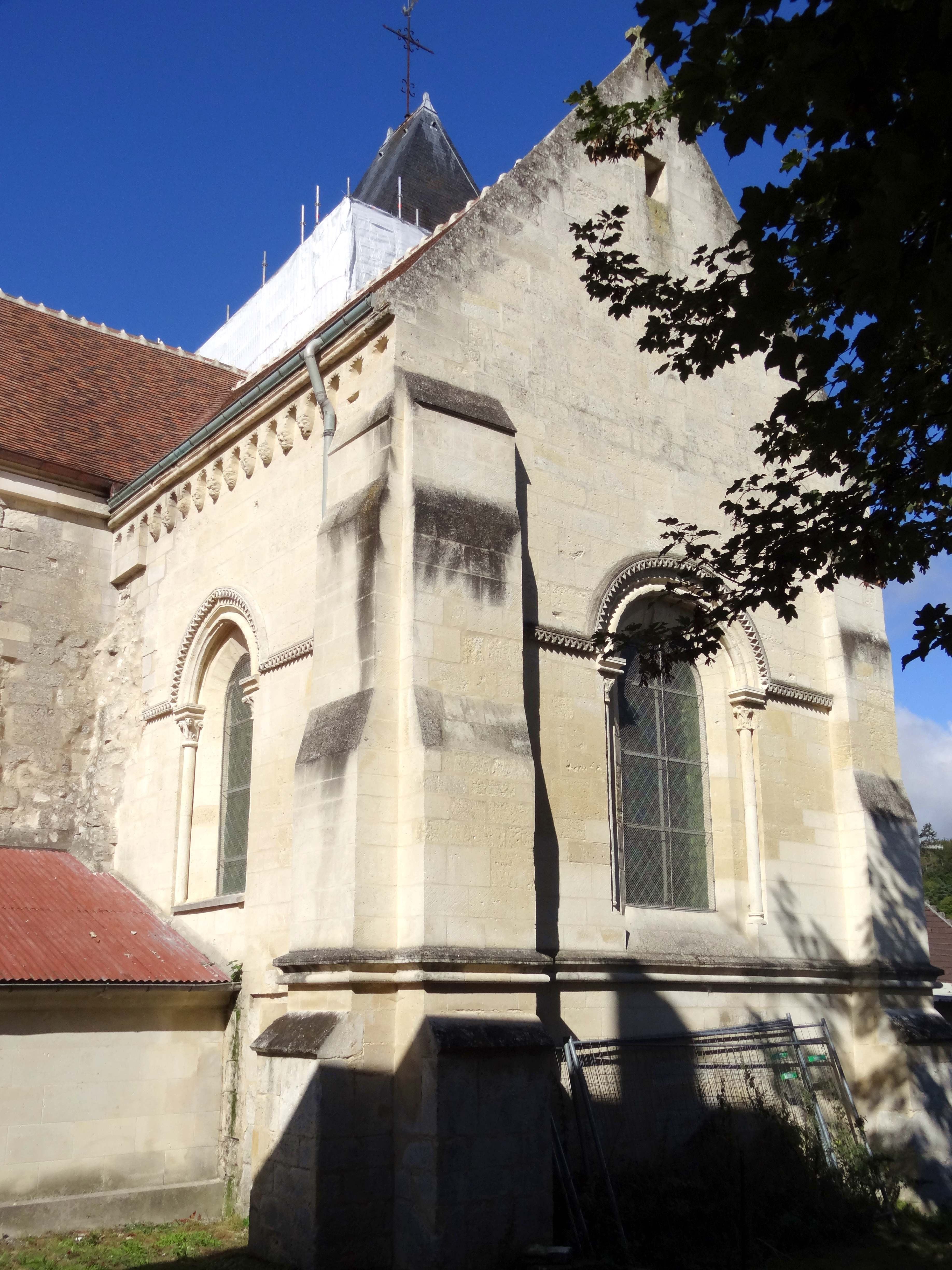 Église Saint-Martin de Bonneuil-en-Valois - voir titre.